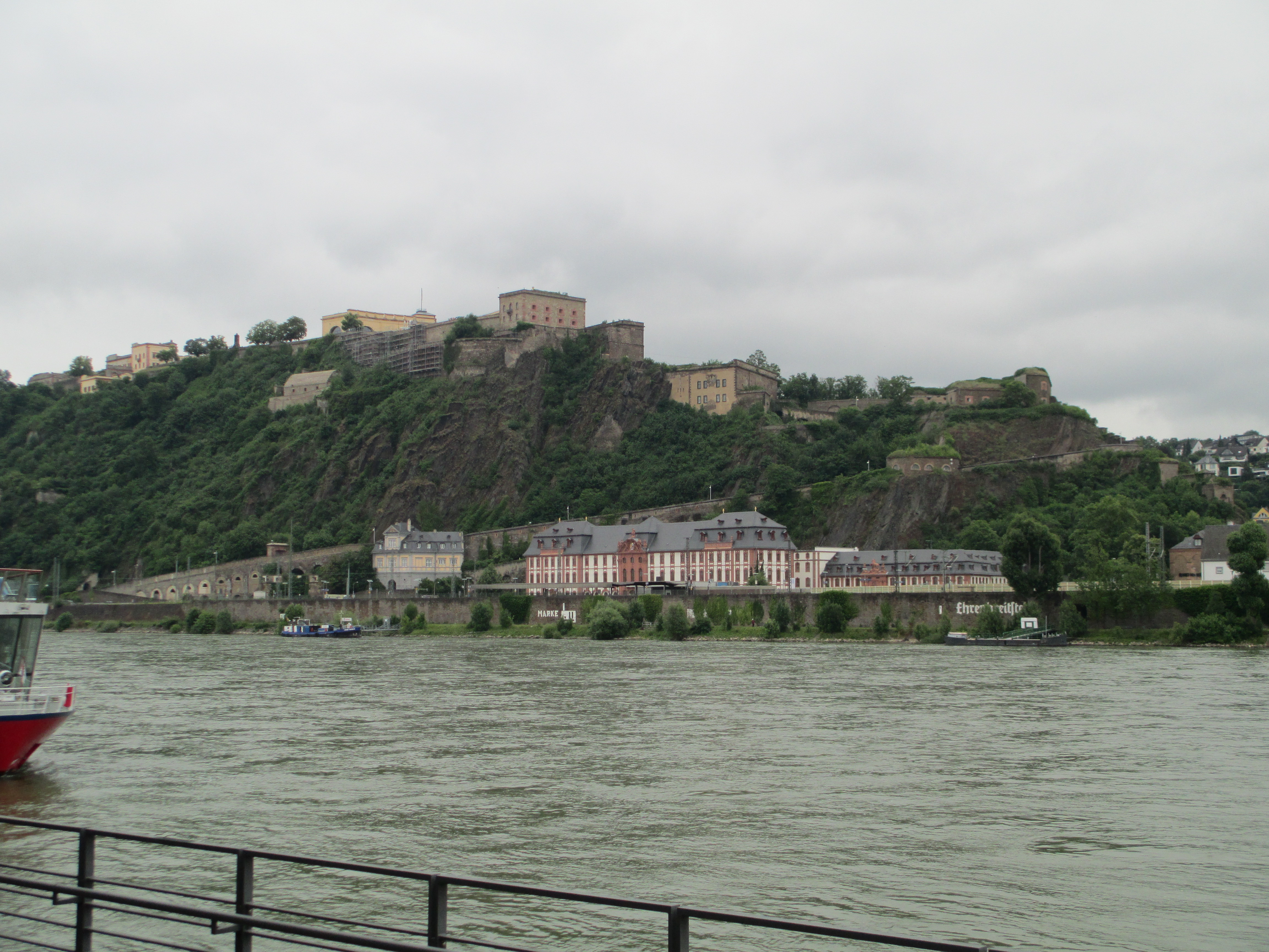 מבצר ארנברייטשטיין